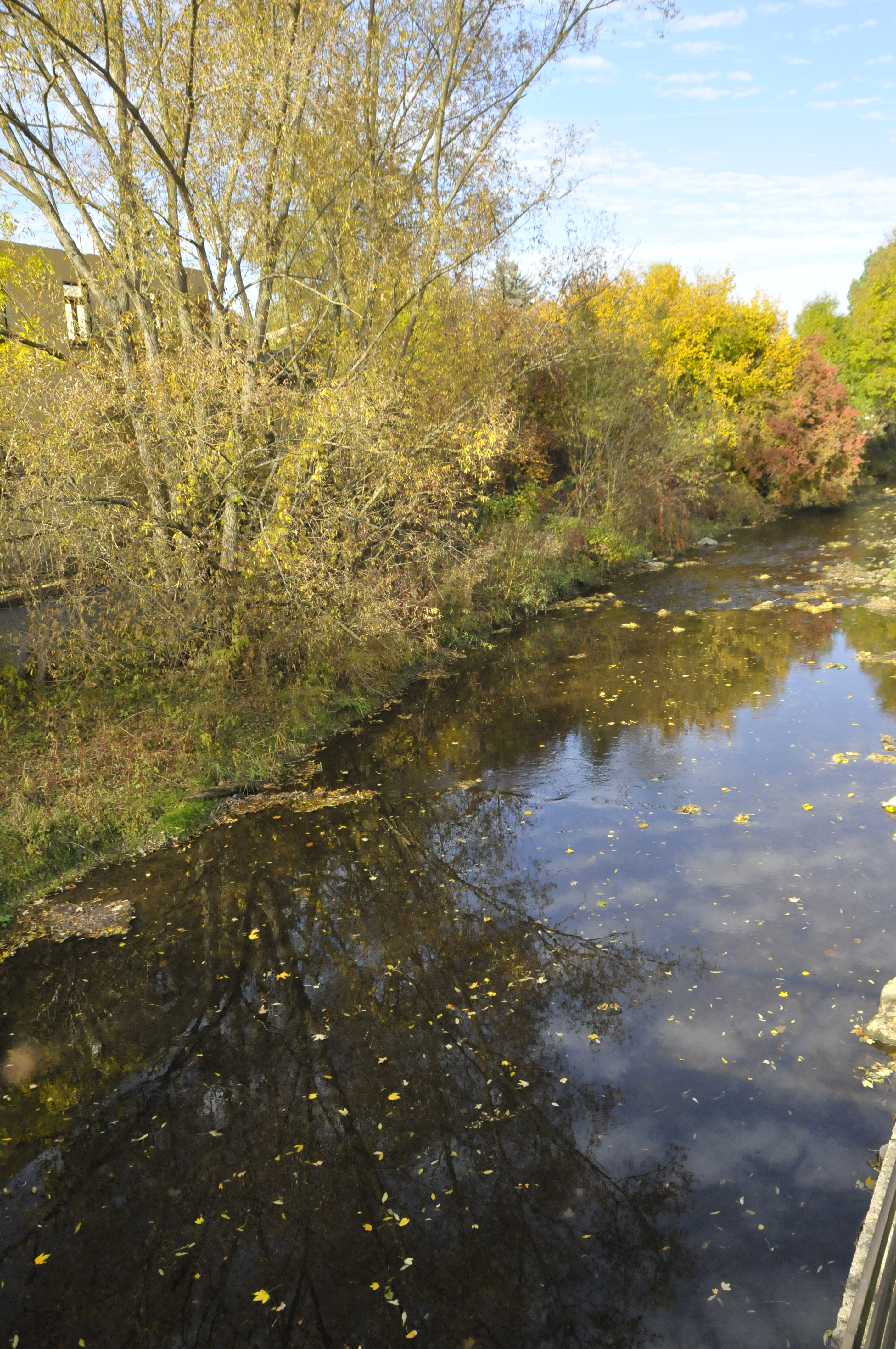 Kranichfeld, Ilm